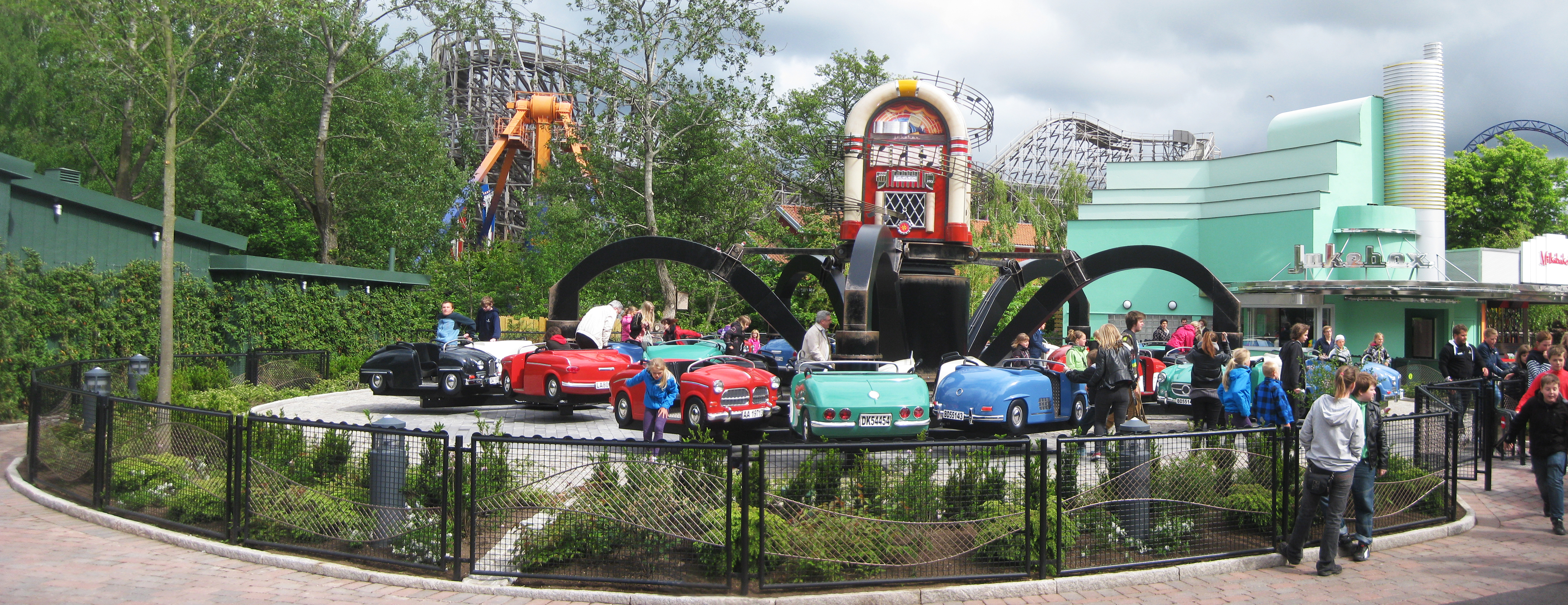 Åkattraktionen Jukebox på Liseberg i juni 2012.